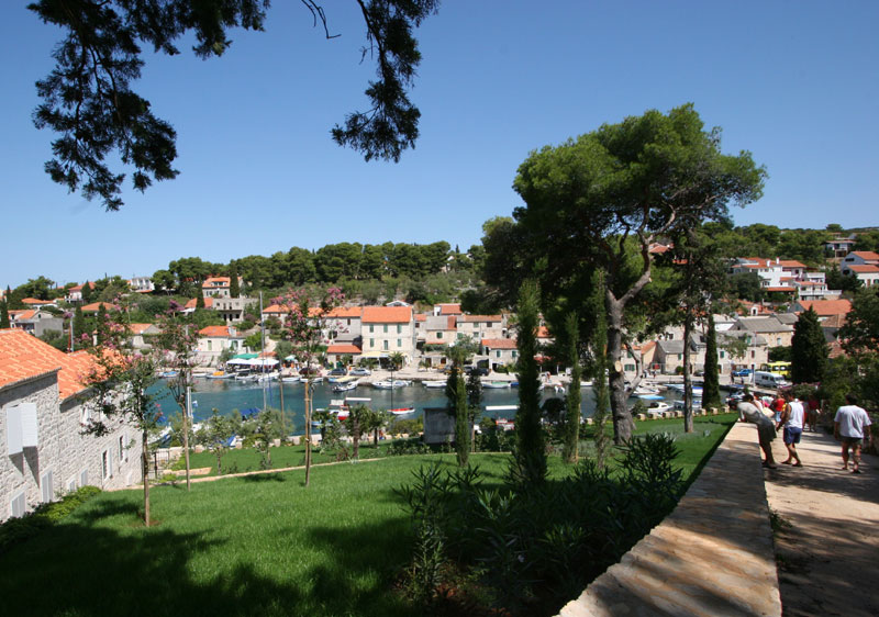 Maslinica auf Solta - selbst fotografiert